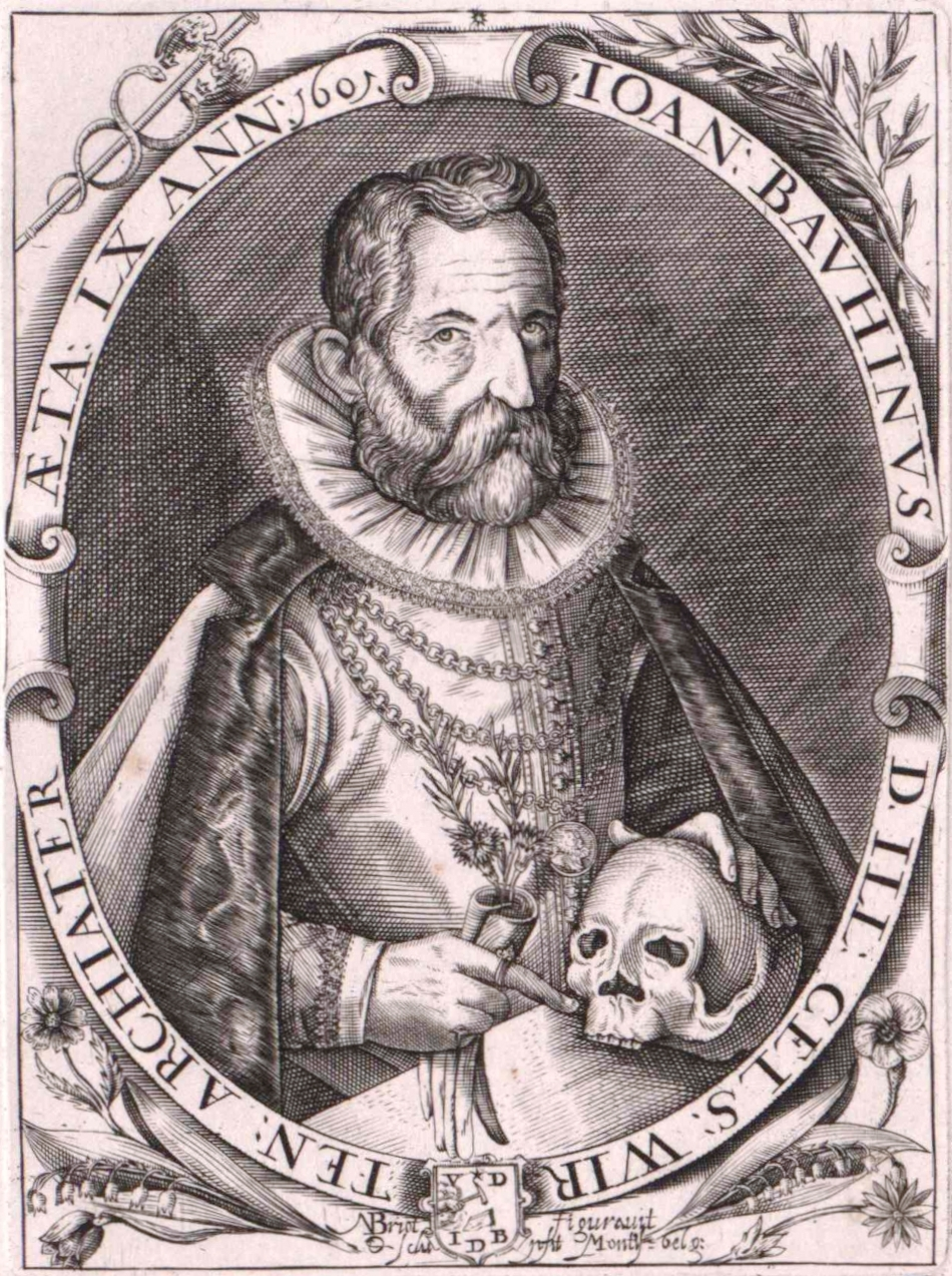 Johann Bauhin jun. (1541–1613)